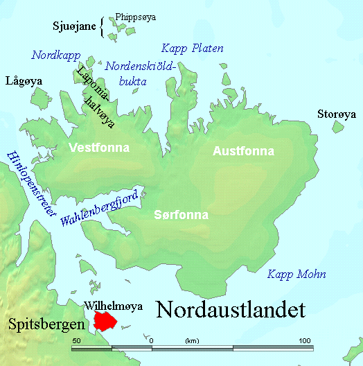 ==Wilhelmøya in red